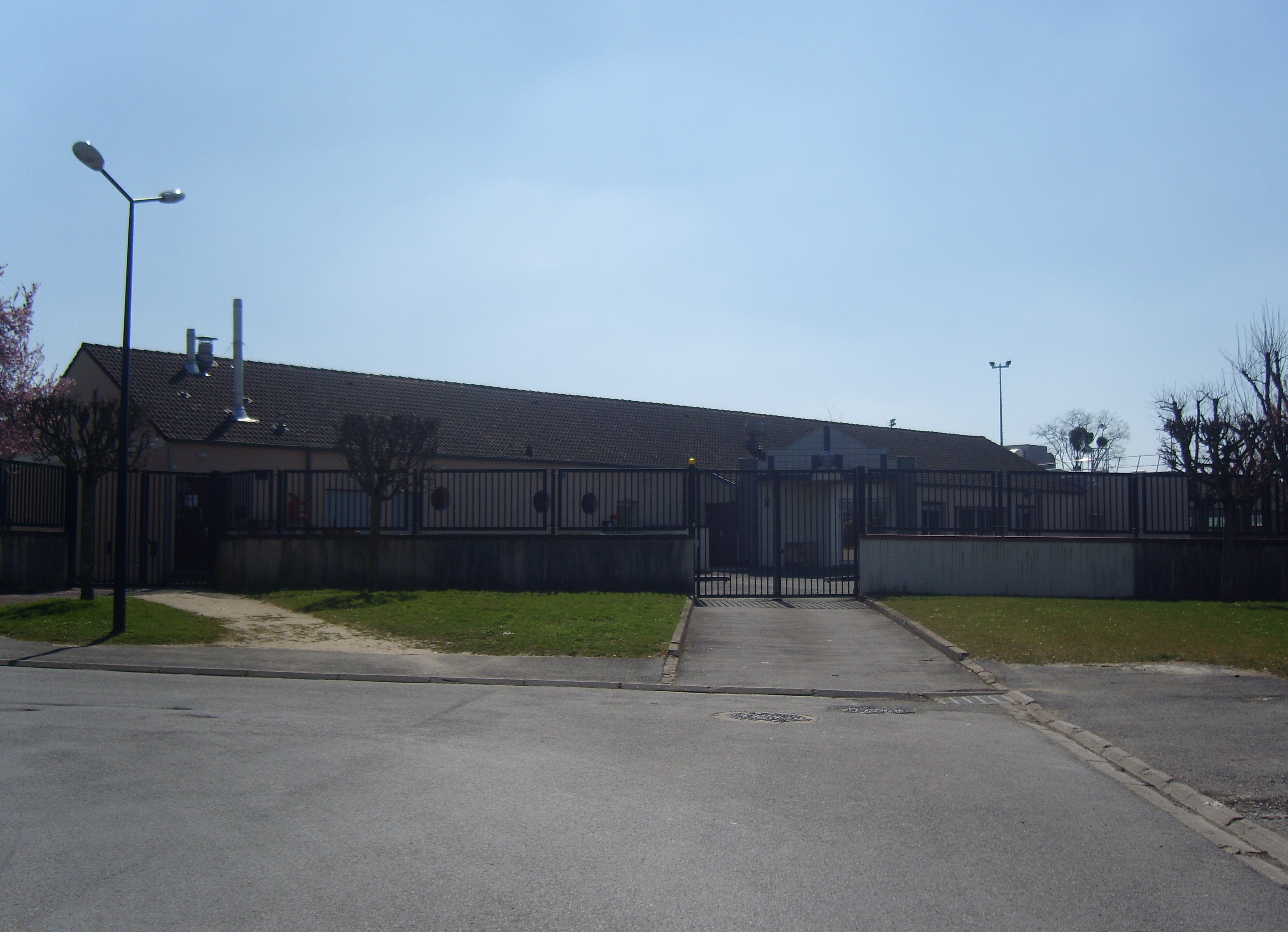 Collège Stéphane Mallarmé de Fontenay-Trésigny